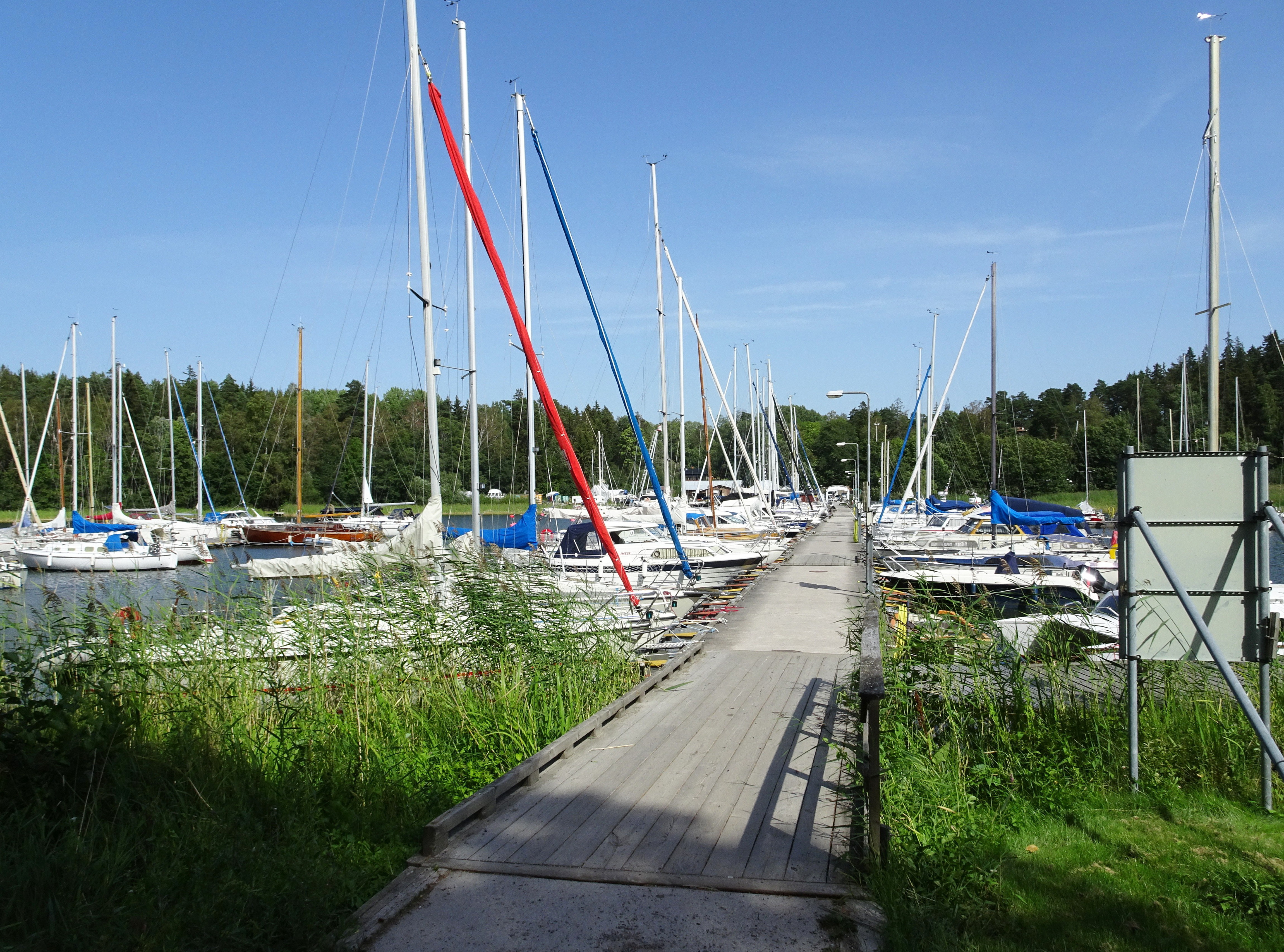 Rastaholms brygga